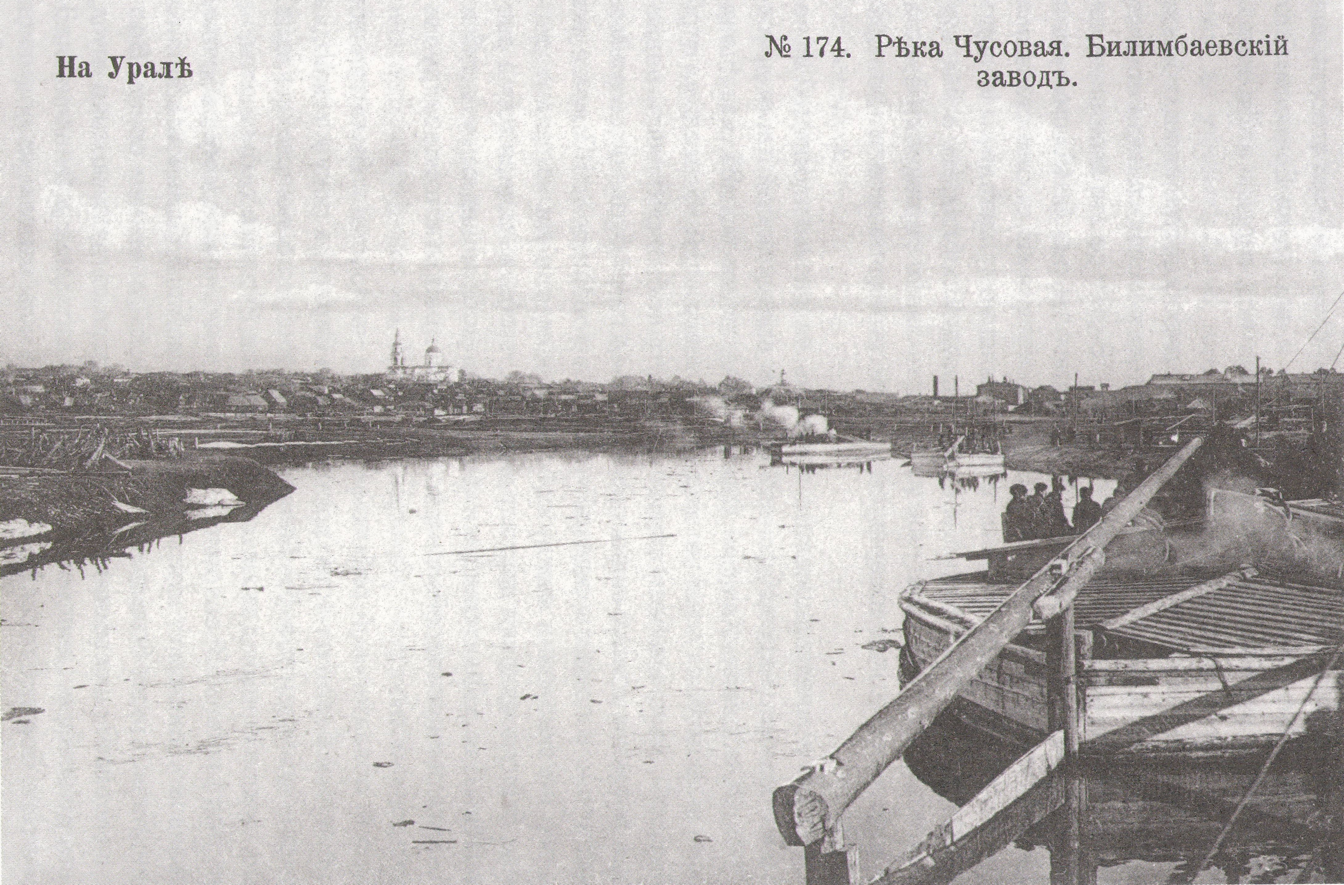 Метенков В.Л. Билимбаевская пристань, 1893